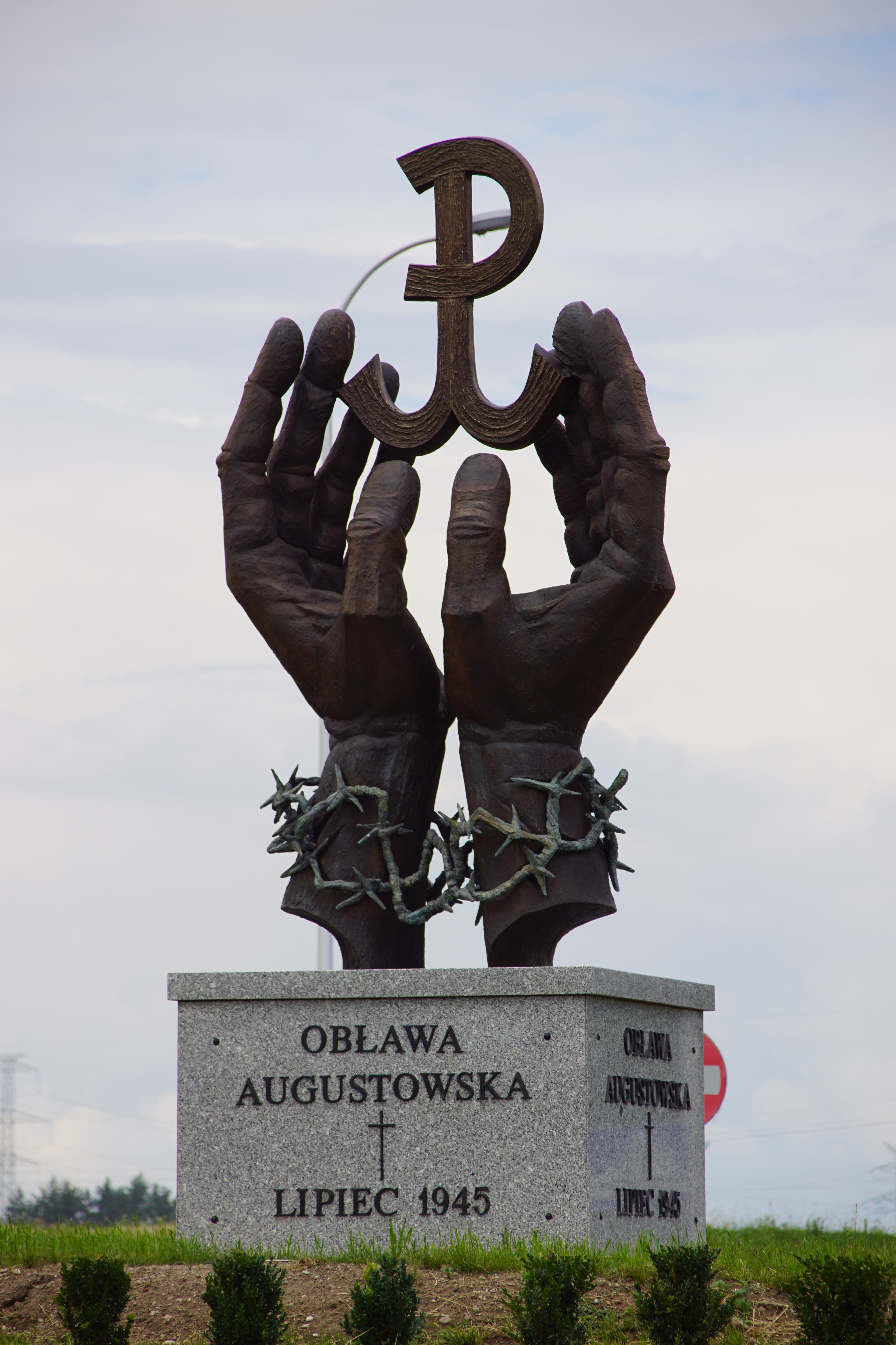 Przy publikacji konieczne podanie informacji o autorze i poinformowanie o publikacji na kamilkorbik(at)o2.pl